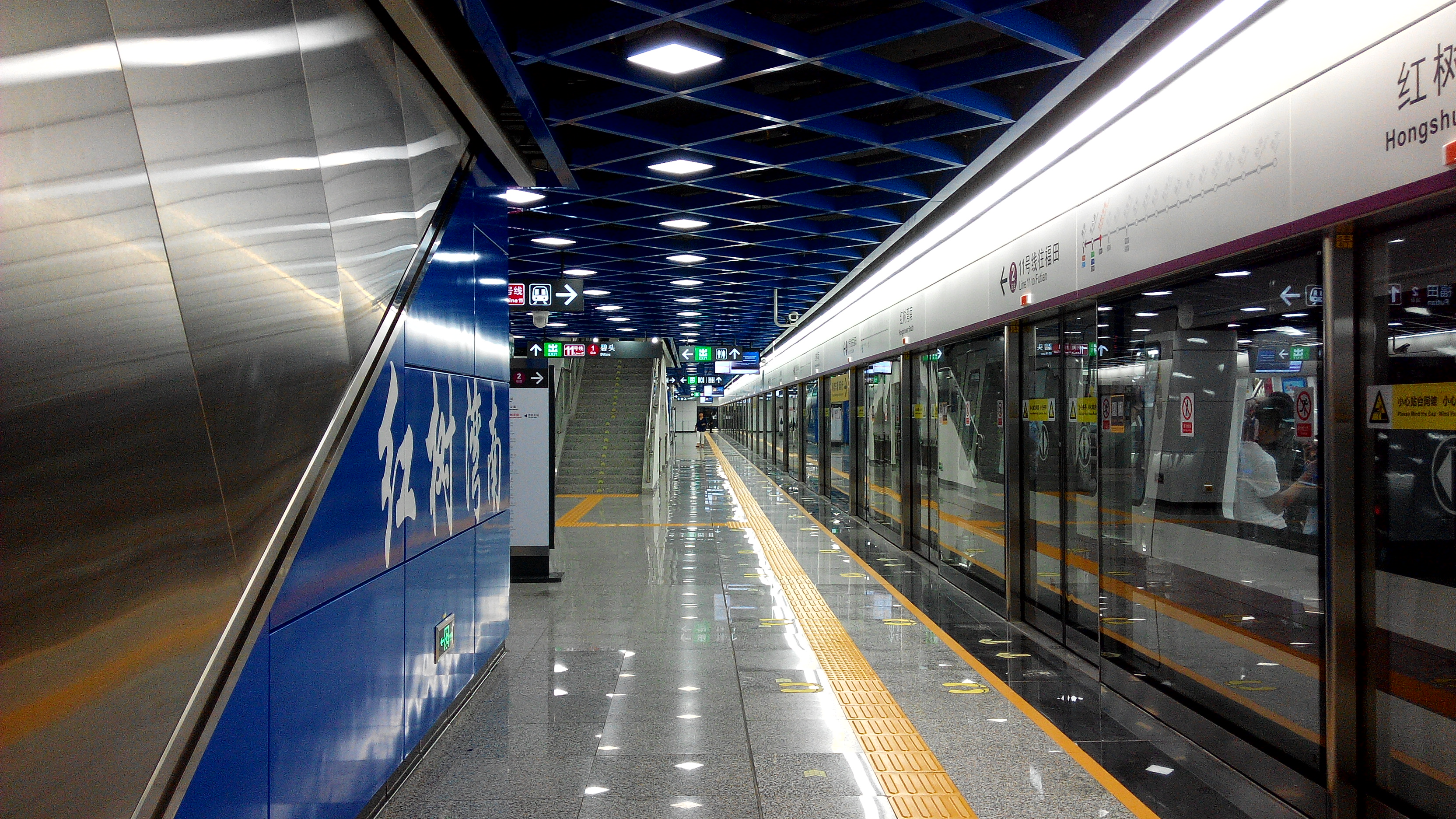 深圳地铁11号线 红树湾站2号站台